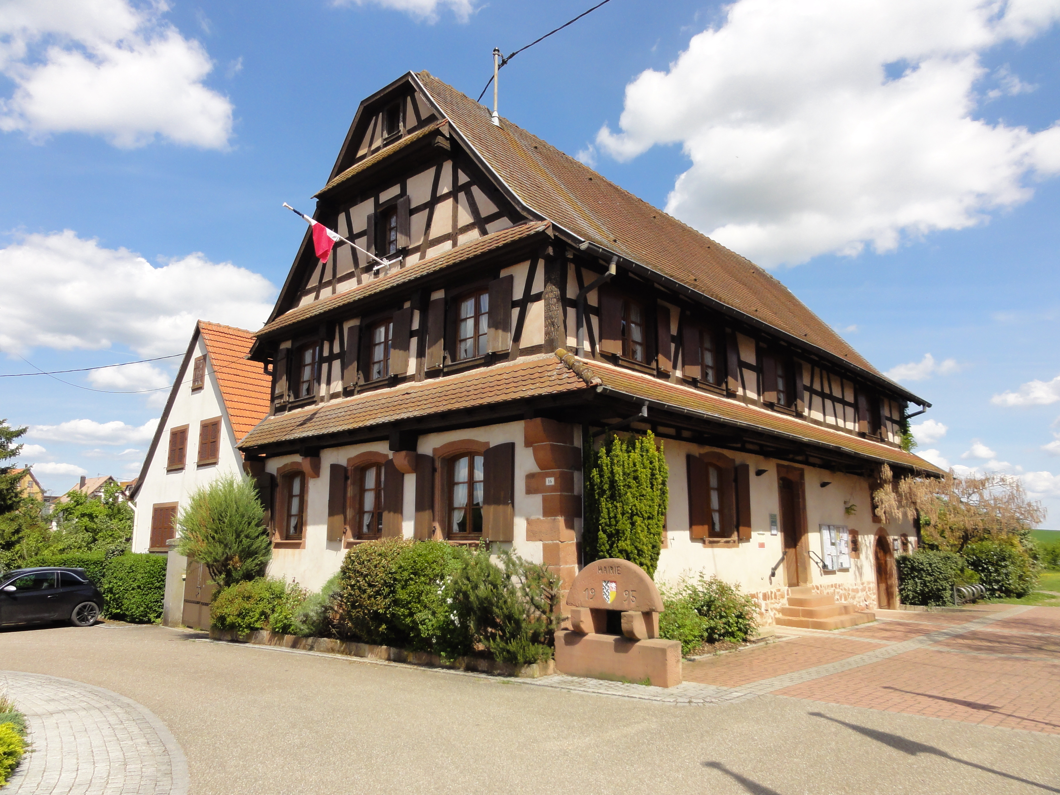 Alsace, Bas-Rhin, Schillersdorf, Maison dite du Stabhalter (1780), actuellement mairie, 16 rue du Pasteur-Schroeder. .